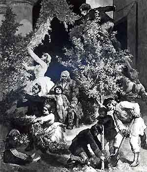 Зелёные святки (Троица) у поляков